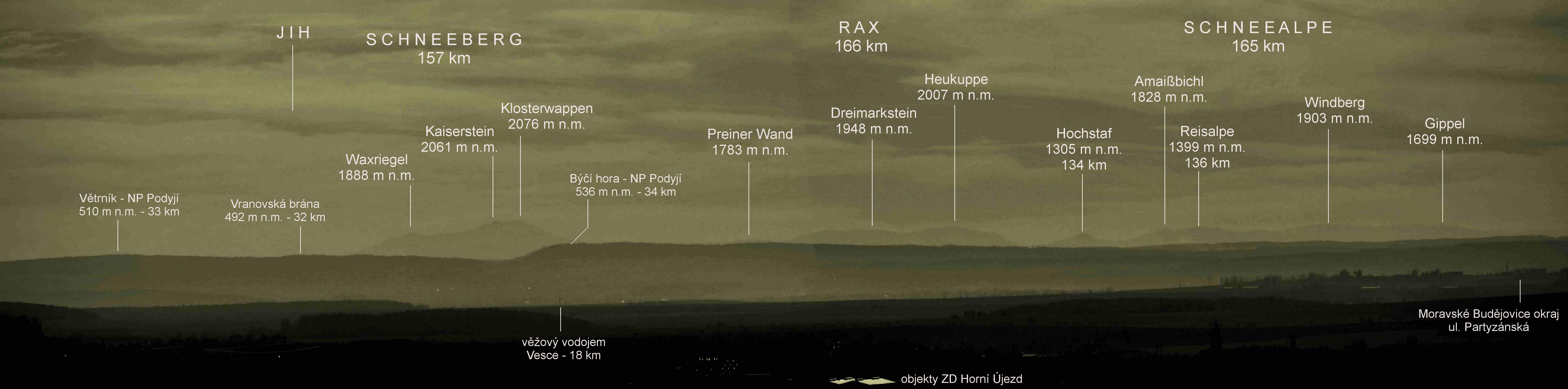 Alpy z Pekelňáku u Třebíče (popisky Bc. Ivo Krčmář)